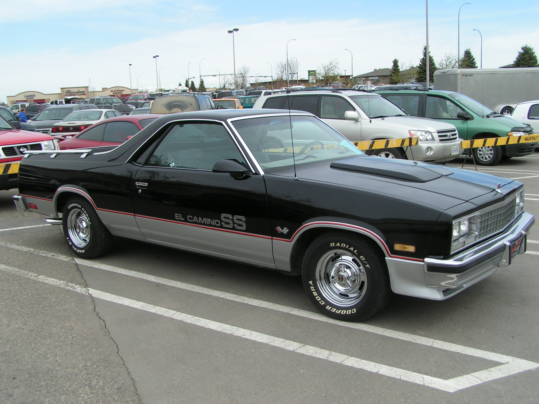 Chevrolet El Camino SS